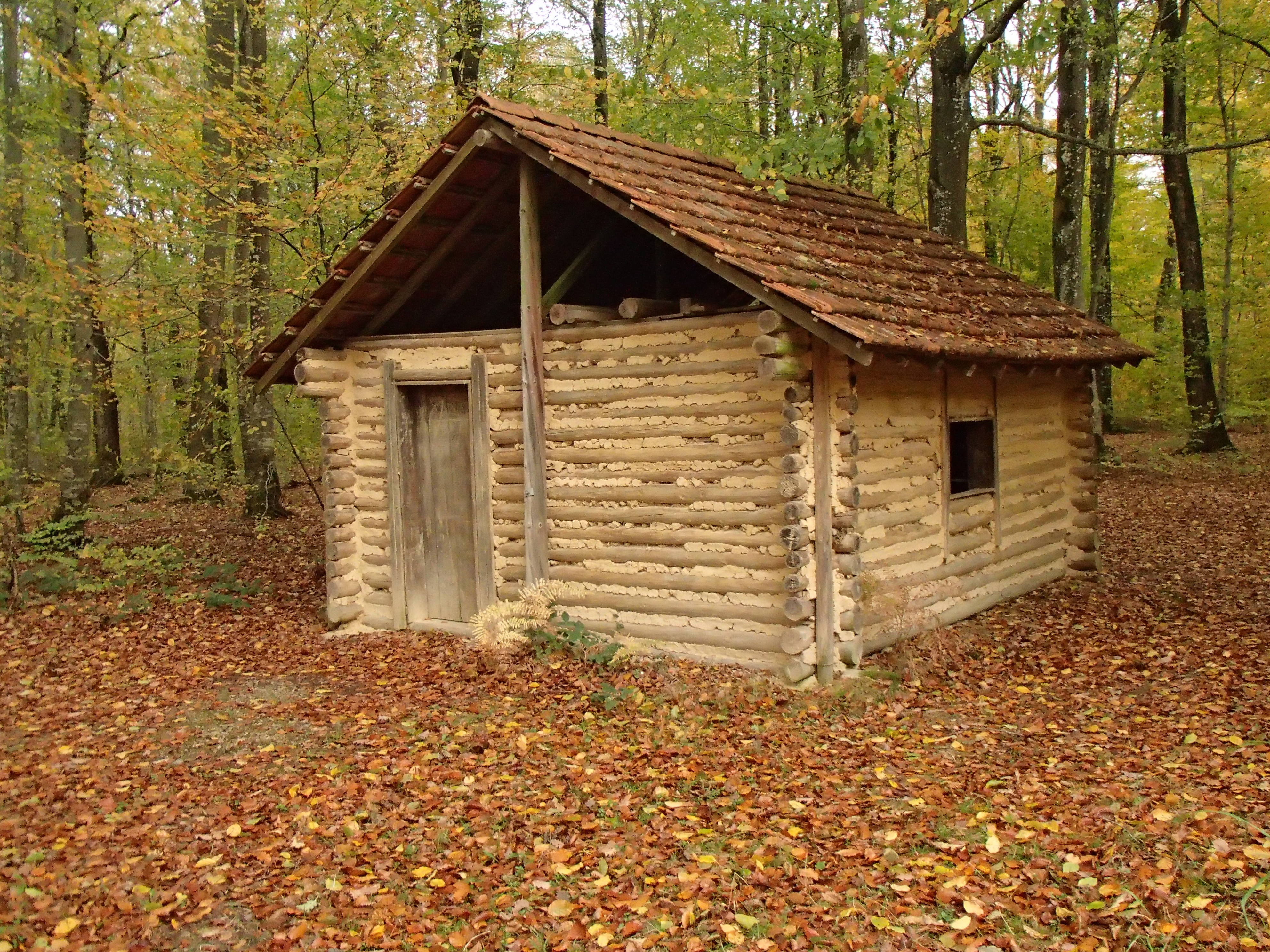 Baccu